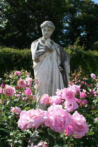 Une statue du jardin du Thabor à Rennes. Il s'agit de "La pensée" de Thomas.